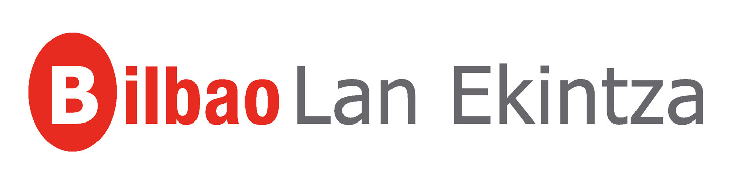 Logotipo de Lan Ekintza